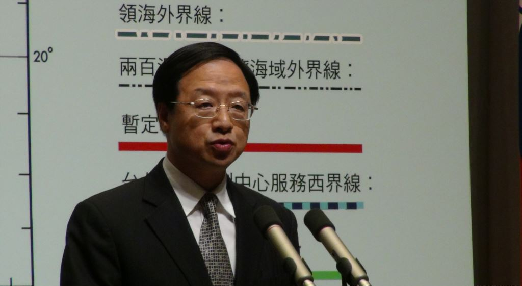 中華民國行政院院長江宜樺